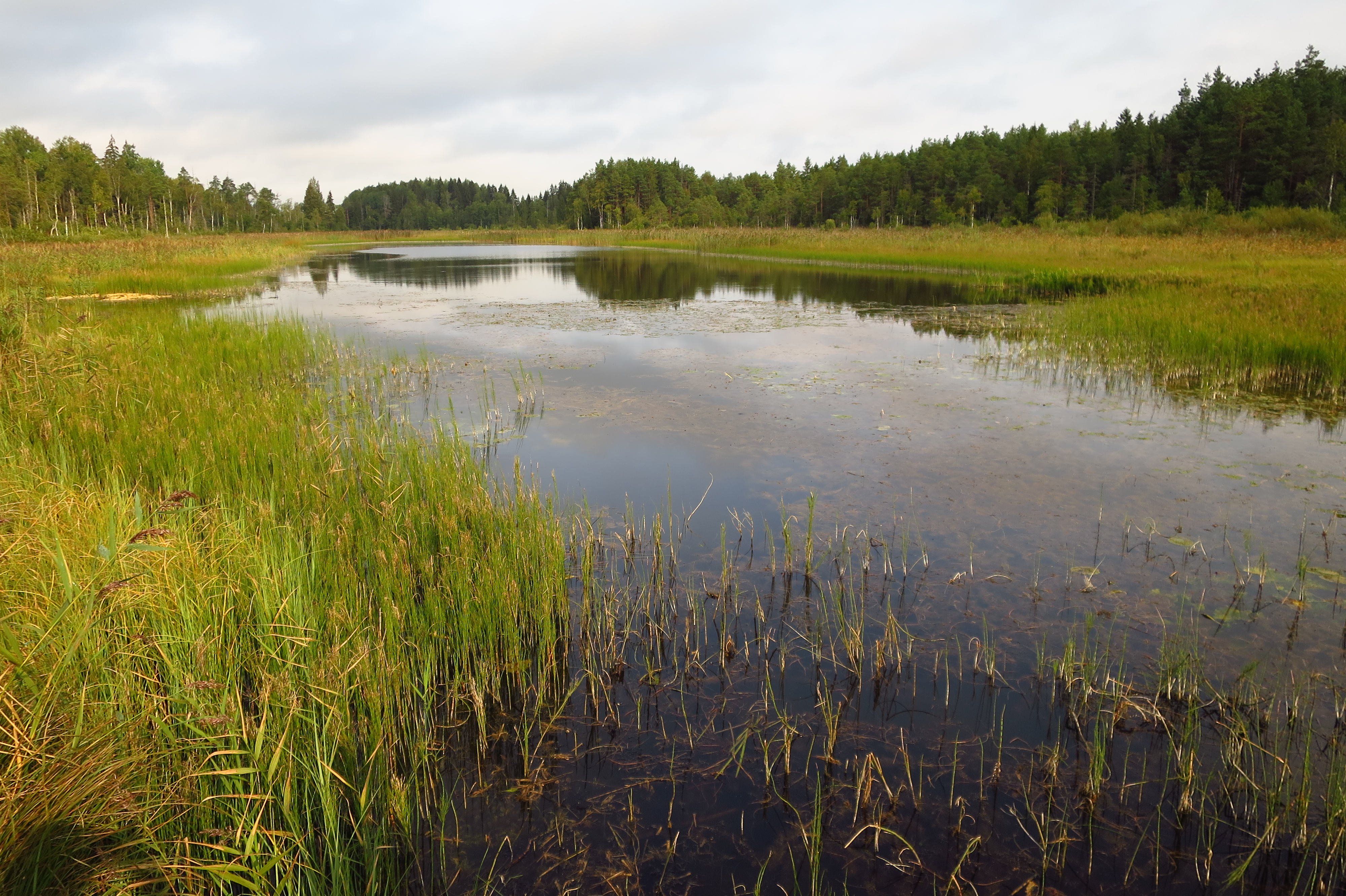 Kaanjärv Äntu maastikukaitsealal